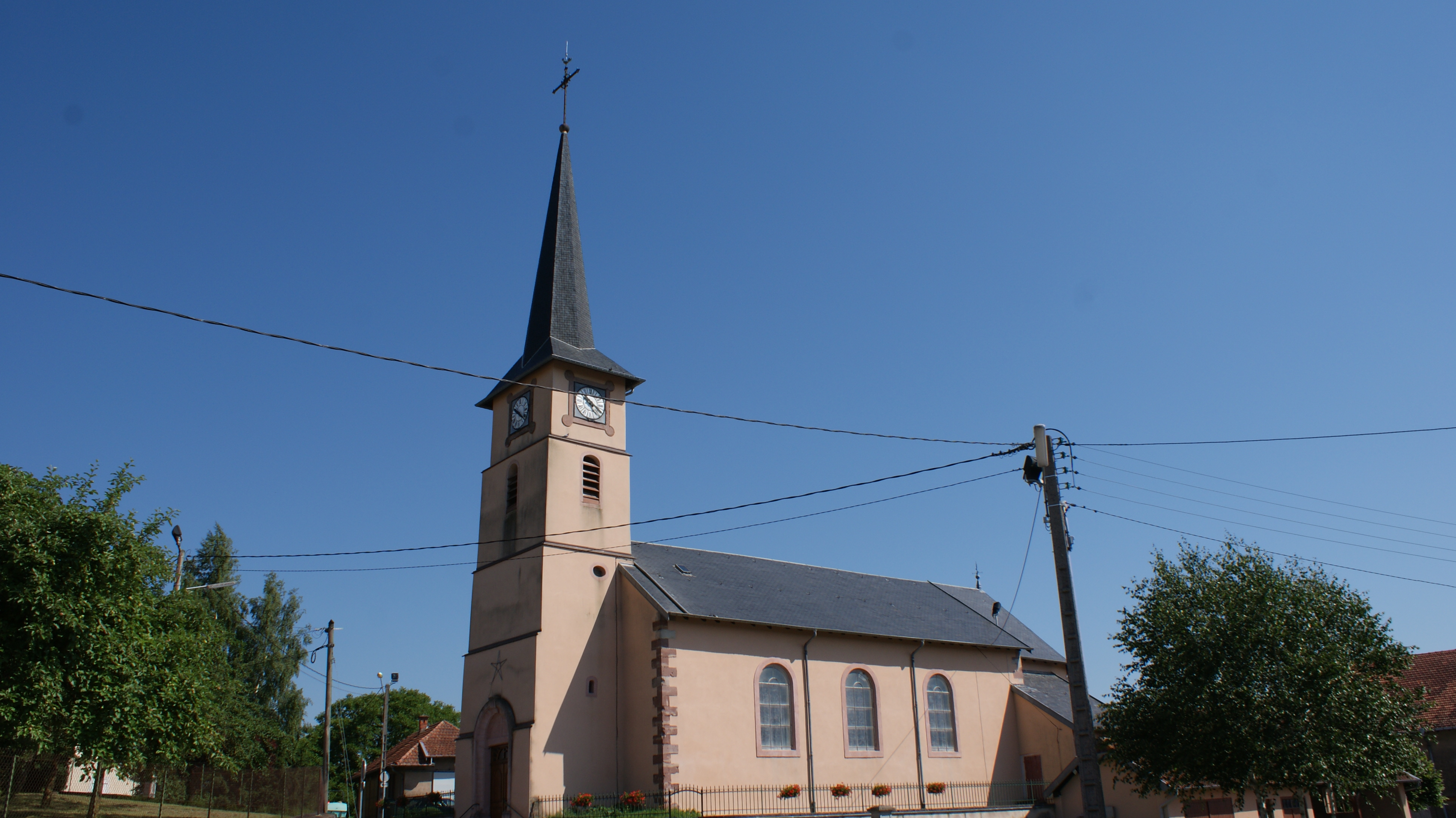 eglise au centre du village